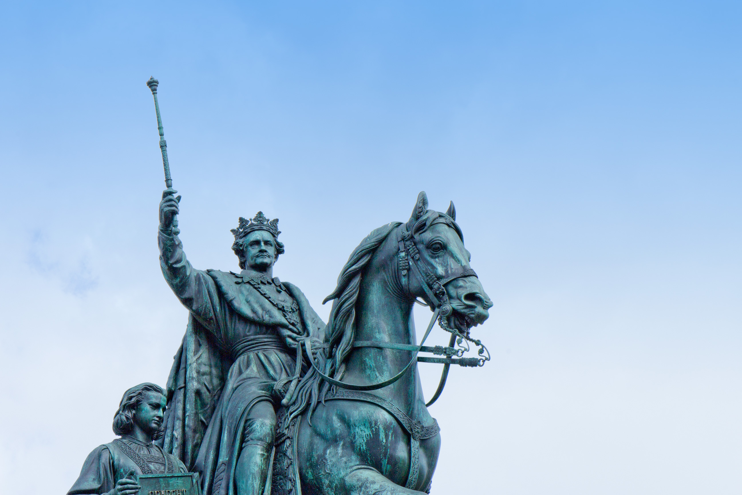 Wikipedia im Landtag – Bayern 17. bis 19. Juli 2012 in München Dieses Foto wurde im Rahmen des Projektes „Wikipedia im Landtag“ erstellt.